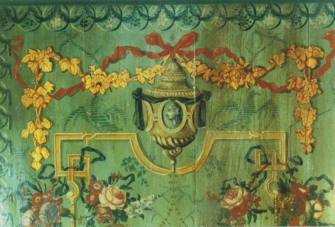 Eine Bunte Wandvertäfelung